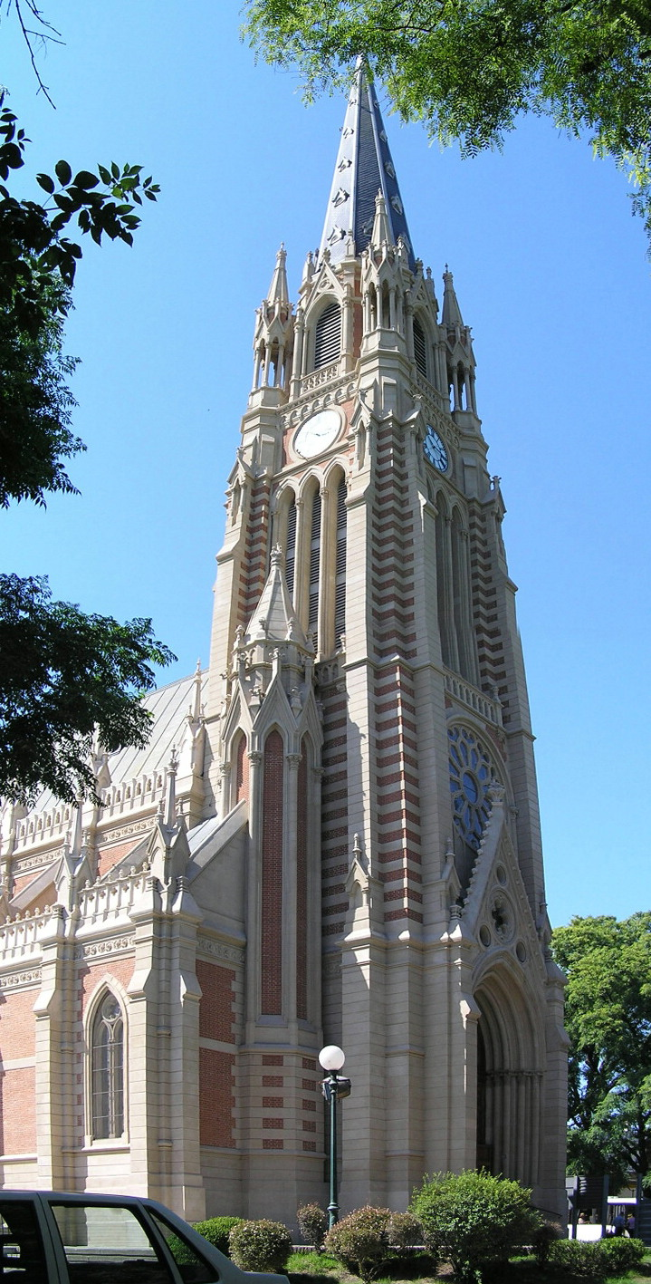 Catedral, San Isidro, provincia de Buenos Aires Author: Mr. Tickle Date: January 28th, 2006 Place: San Isidro (Argentina)